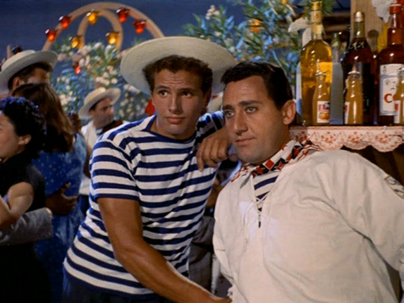 Italian actors Giuliano Gemma and Alberto Sordi in the film Venezia, la luna e tu